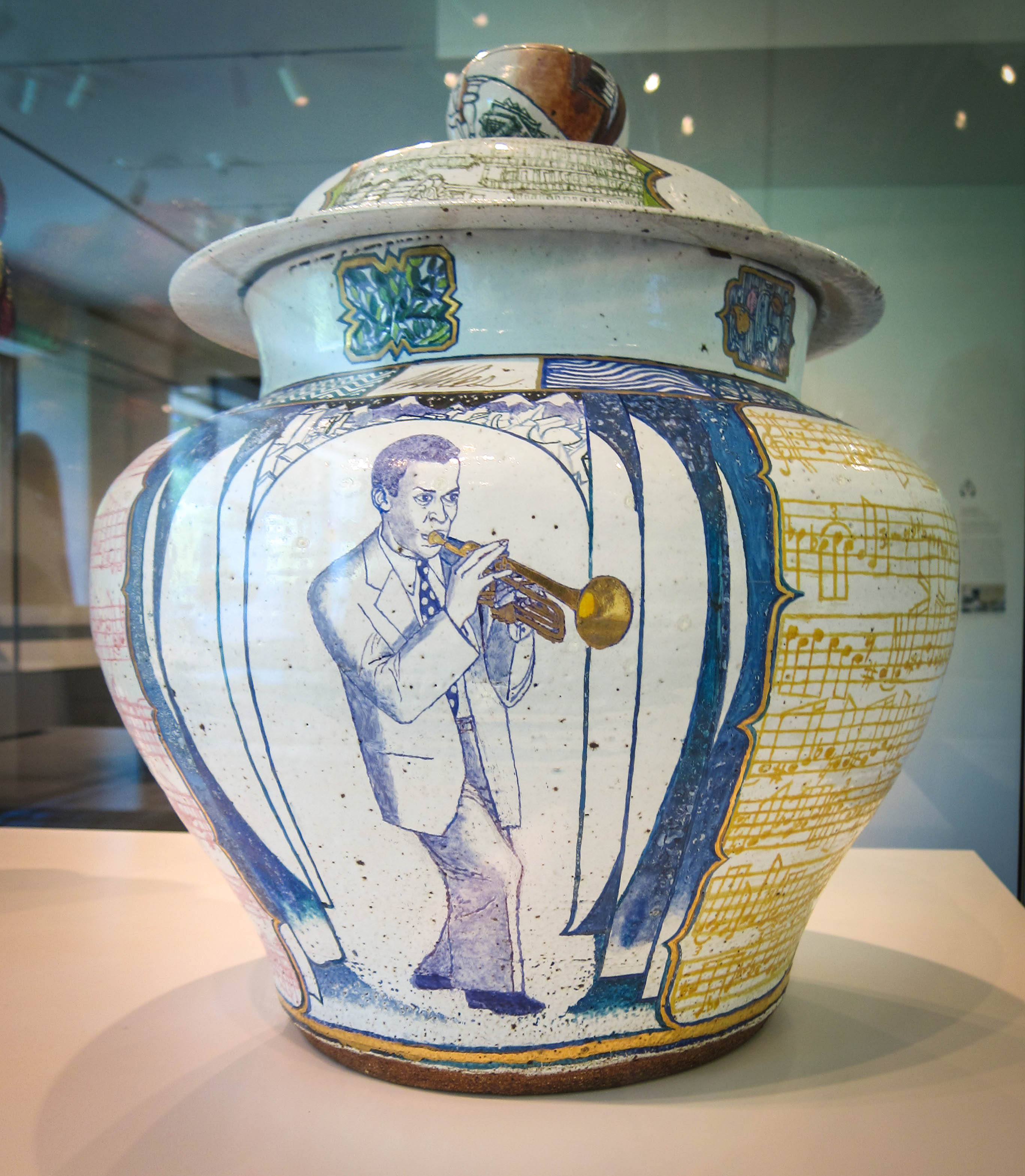 Michael Frimkess, Magdalena Suarez Frimkess, Blues for Dr. Banks [Miles Davis], 1972-74